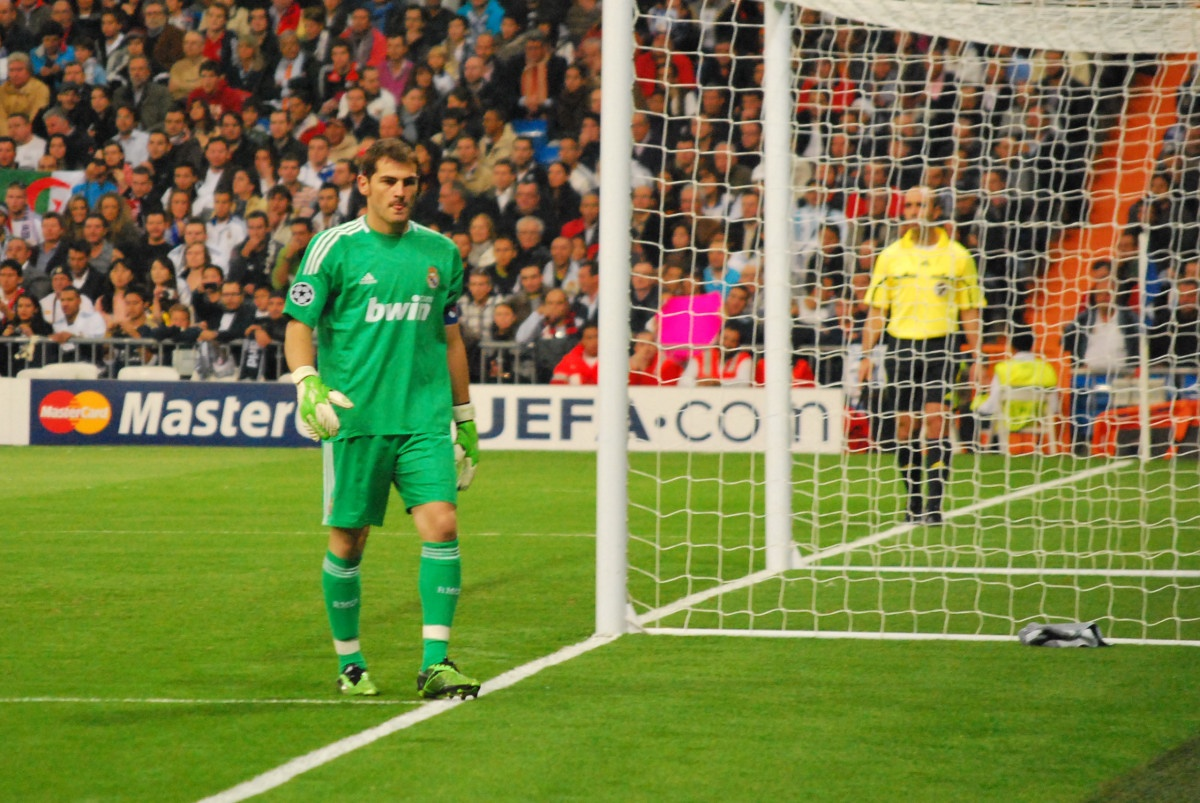 Iker Casillas